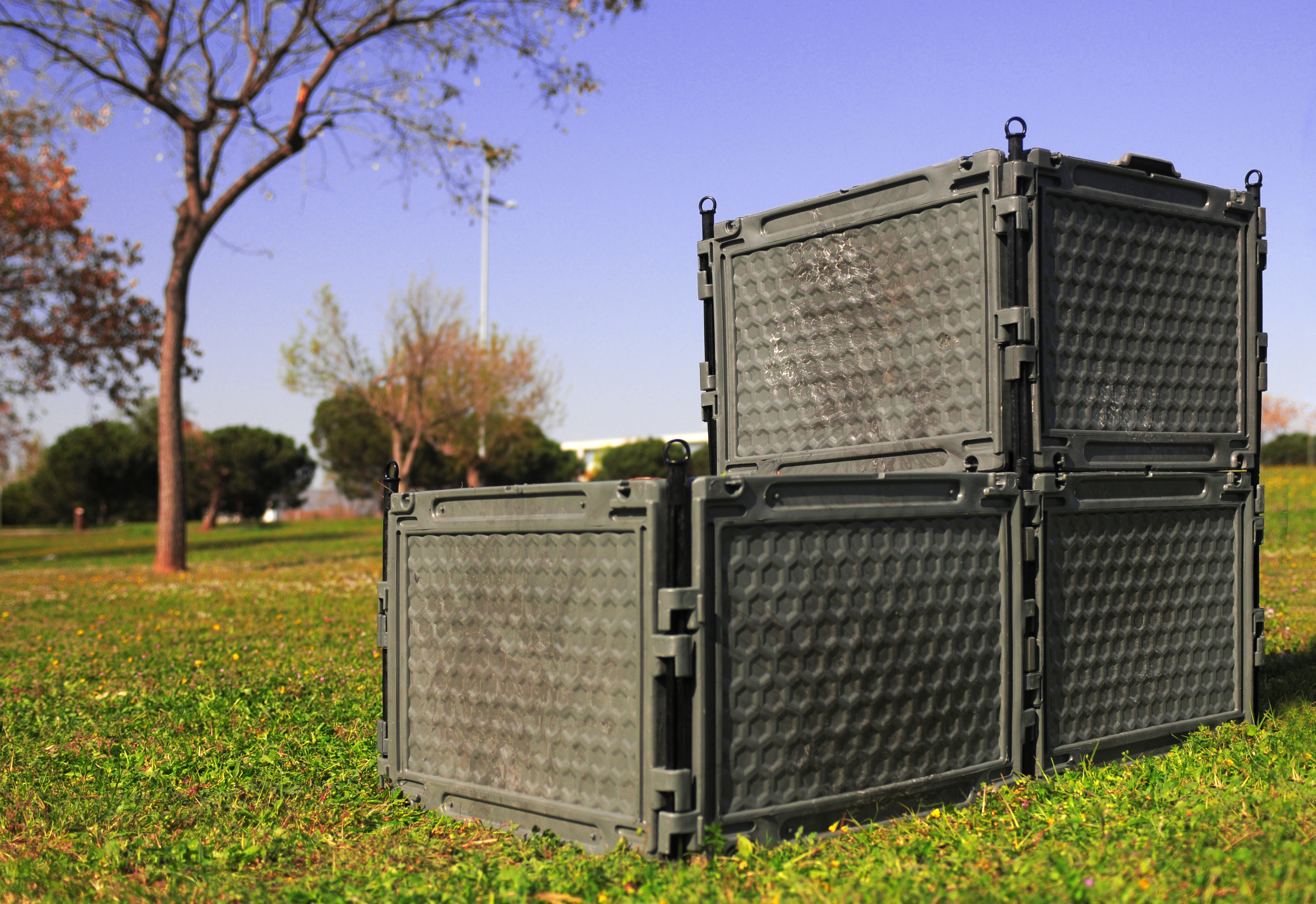 El combox: un compostador, una jardinera, un huerto, una caja de herramientas, un almacén de hojas secas... Tiene múltiples usos y es modular, ampliable y compartimentable. Formado por módulos con o sin tapa y con o sin base, según las necesidades.